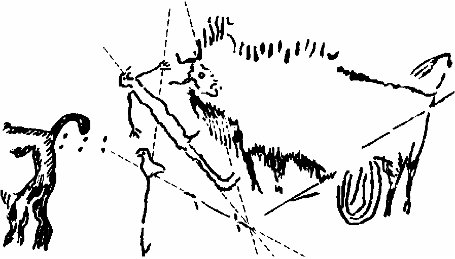 Aus Astronomie-Buch 1898. Weltweit erstes astr.Dokument in Höhle Lascaux (F): 17000 Jahre alte Jagdszene, Bison (mit Speer) blickt schmerzlich auf Schamane (Vogelkopf, 4 Finger) und Vogel (auf Stange). Augen der drei Figuren vermutlich 3 Sterne des Sommerdreiecks: flieg.Schwan (Kopf, Arme, Leib), Leier und Adler. Andere Deutung: Beschwörung mit Tierkreiskarte Löwe (Nashorn links), Zwillinge (2x3 Punkte), Milchstraße (Vogel auf Pfad), Schwert (Phallus), Stier (Bison) und Hyaden-Sternhaufen (Augen, Hörner). --Geof 09:15, 11. Nov 2005 (CET)